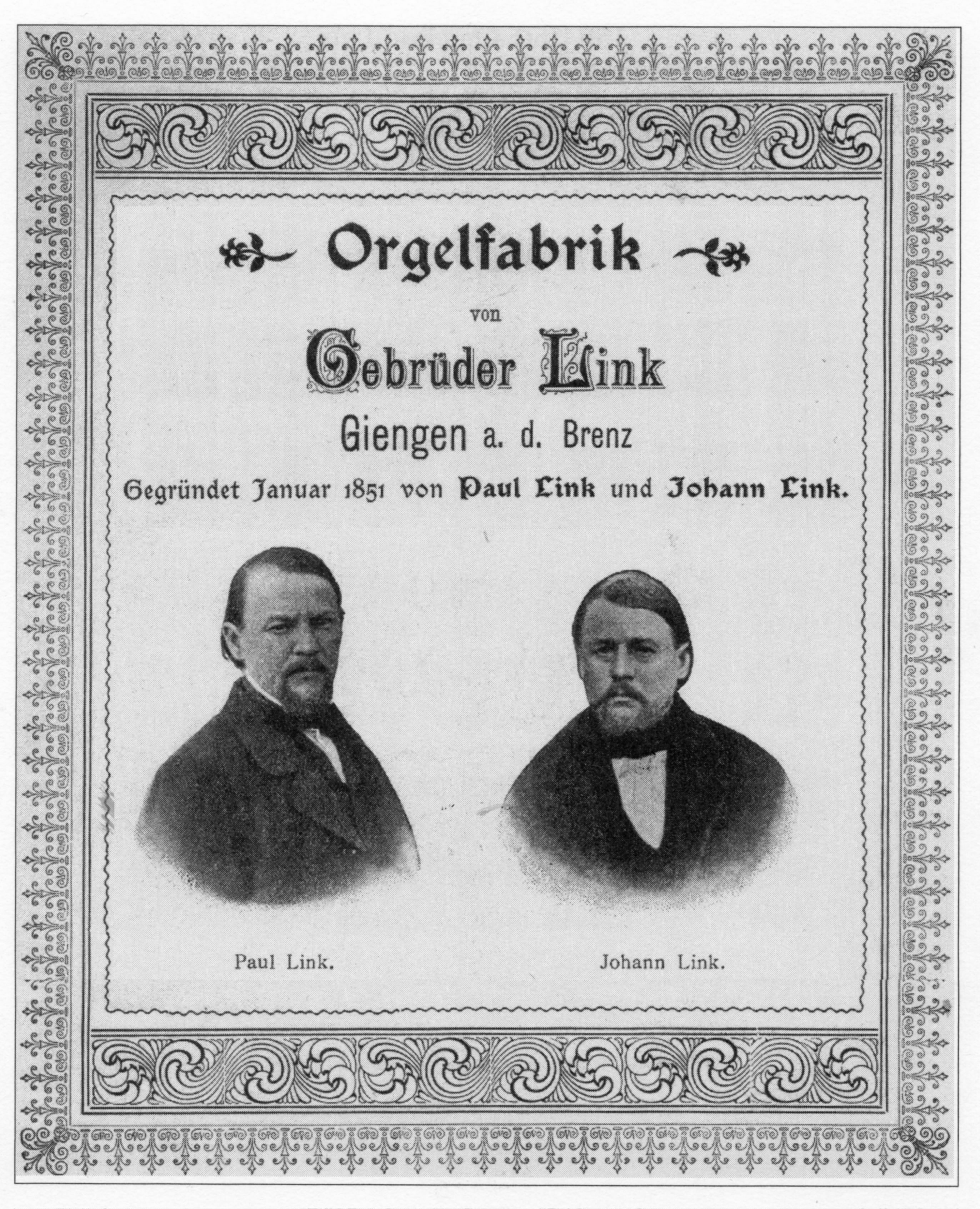 Bild zeigt Firmenprospekt der Orgelbaufirma LINK, Giengen